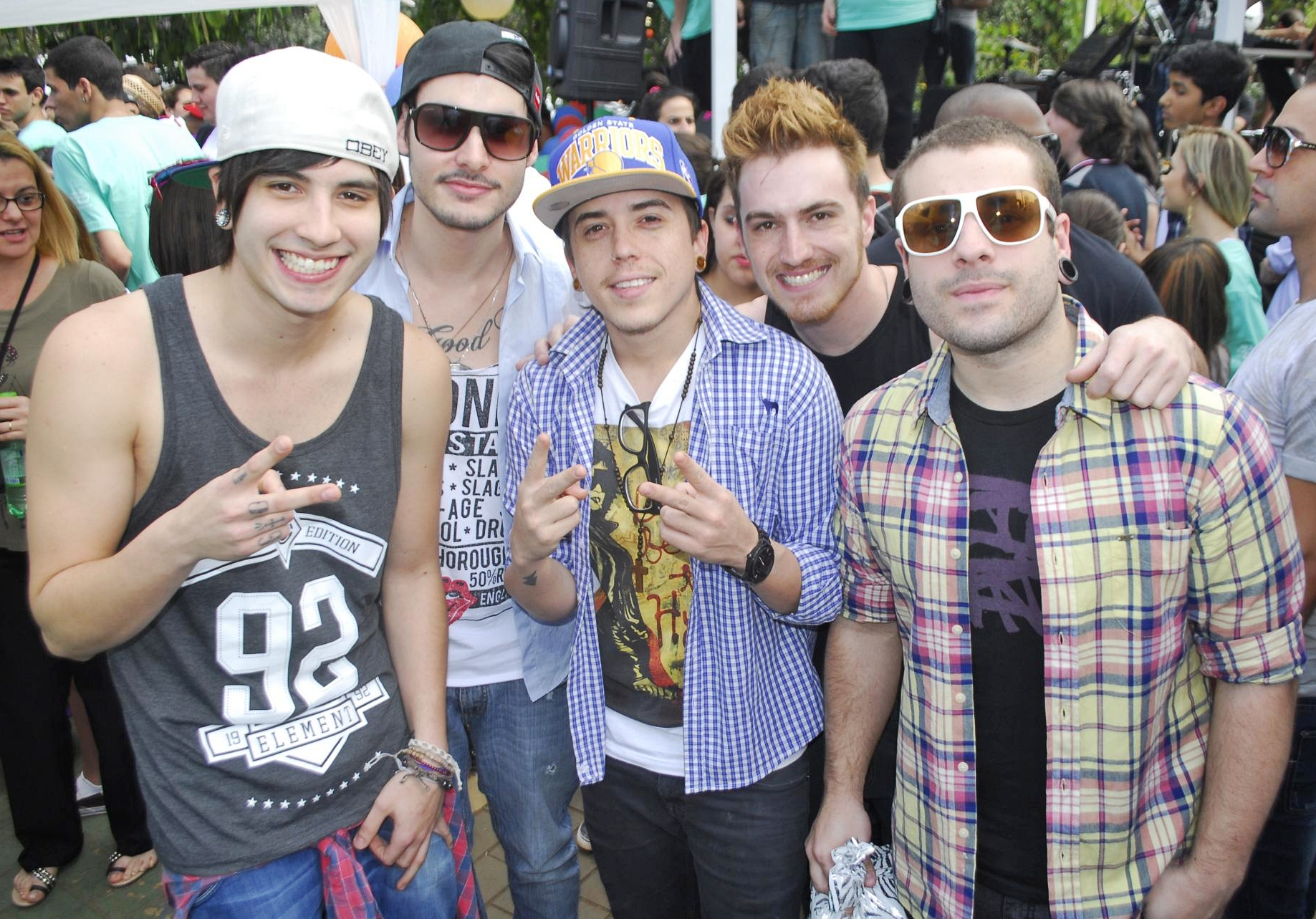 Banda Cine no McDia Feliz de 2012.